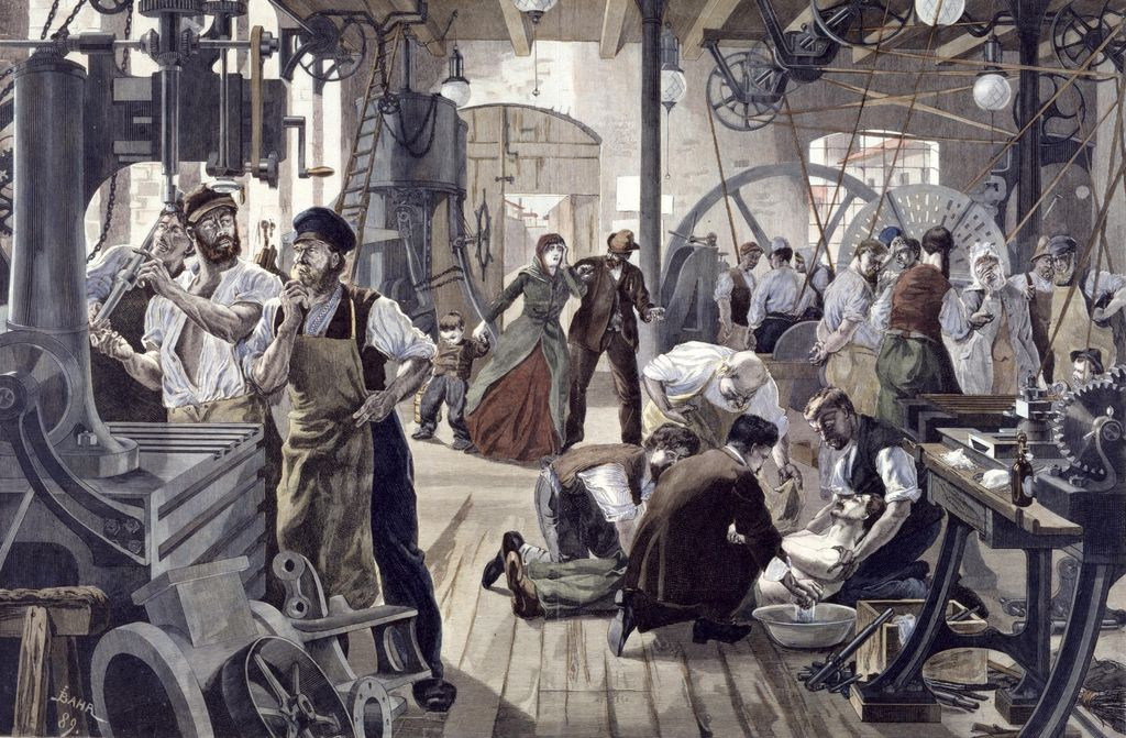 Johann Bahr Unfall in einer Maschinenfabrik aus: Illustrierte Zeitung Nr. 2402, Leipzig 1889 Zeichnung/Druckgrafik 32,4 x 48 cm © Deutsches Historisches Museum, Berlin Inv.-Nr.: 1989/918